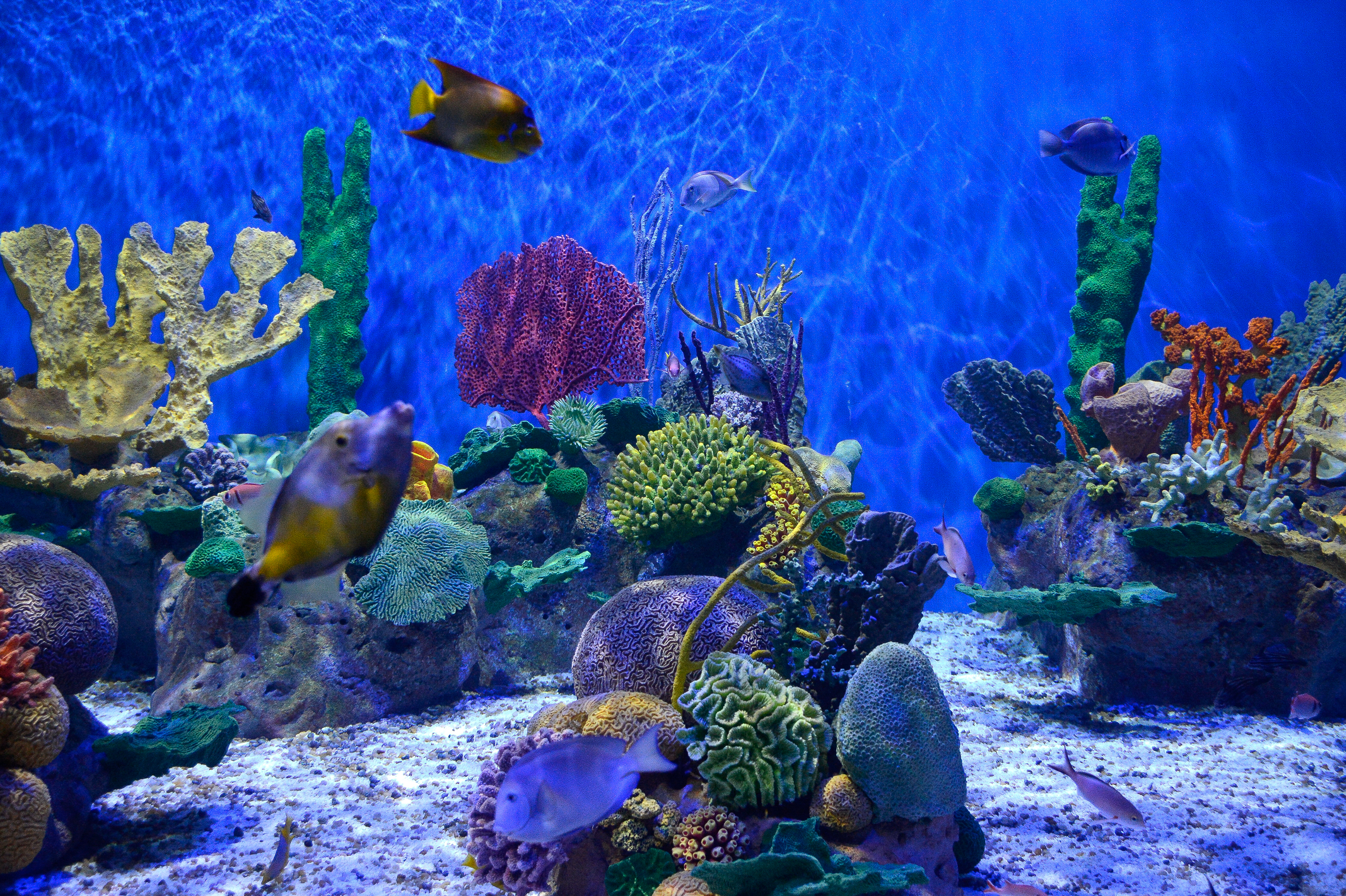 Rio de Janeiro - Em evento no AquaRio a ONU Meio Ambiente lança a campanha mundial "Mares Limpos", que durante cinco anos terá ações para conter a maré de plásticos que invade os oceanos (Tânia Rêgo/Agência Brasil)